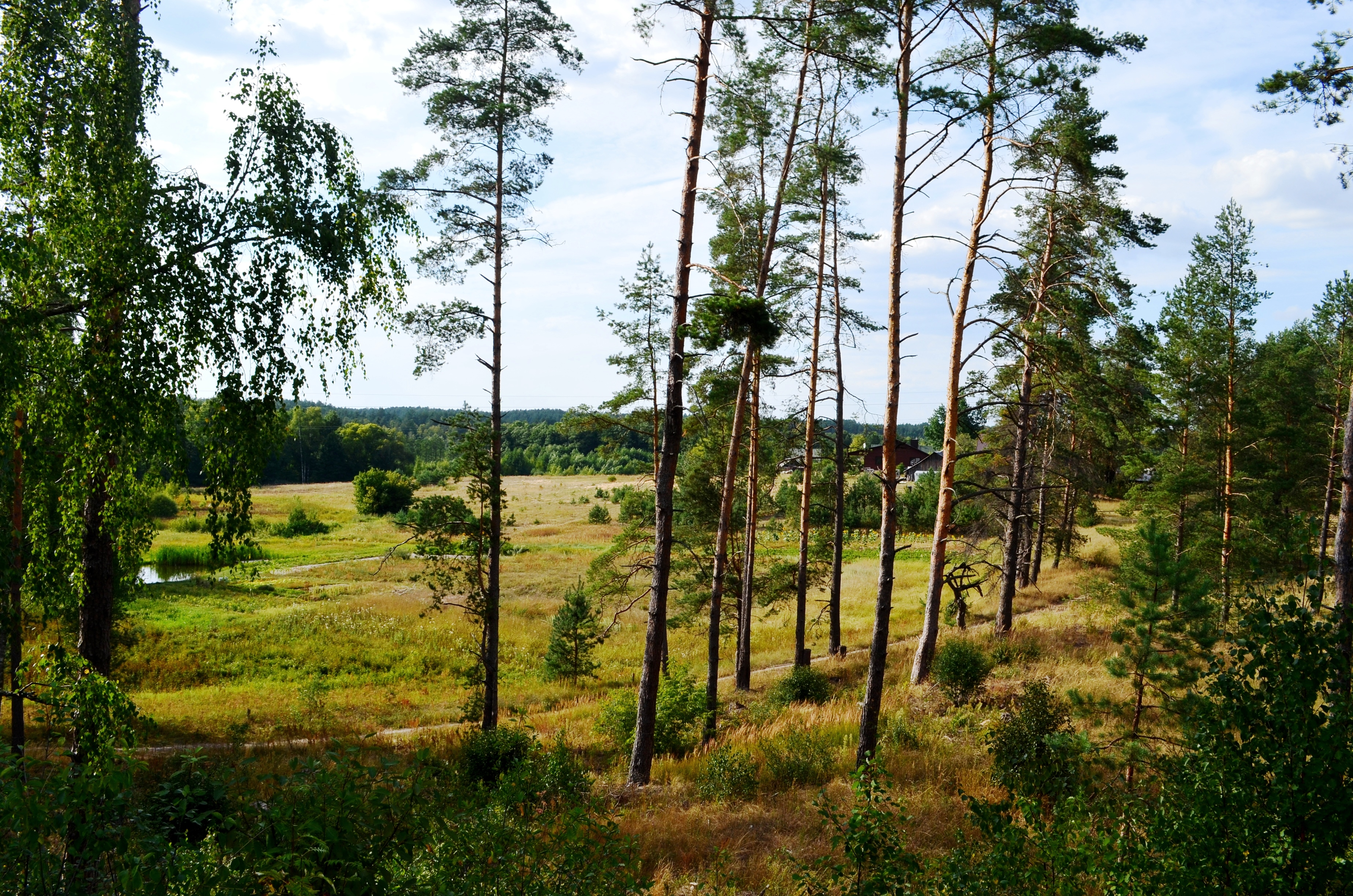 Mergežeris, Varėnos r.